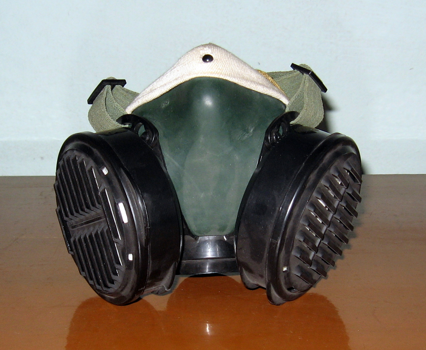 Используется горнорабочими